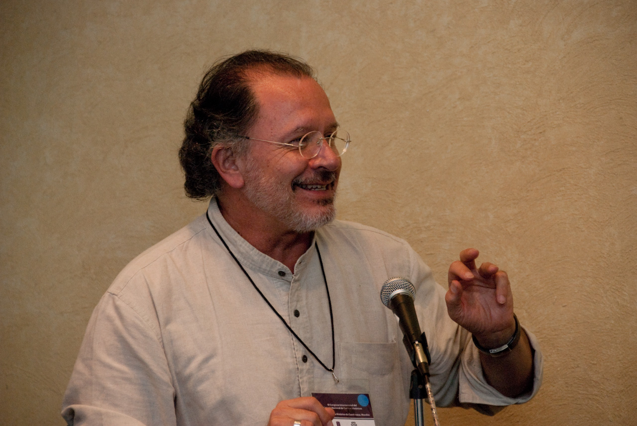 Taller de Indicadores para Centros Históricos, Manuel Martínez Fernández